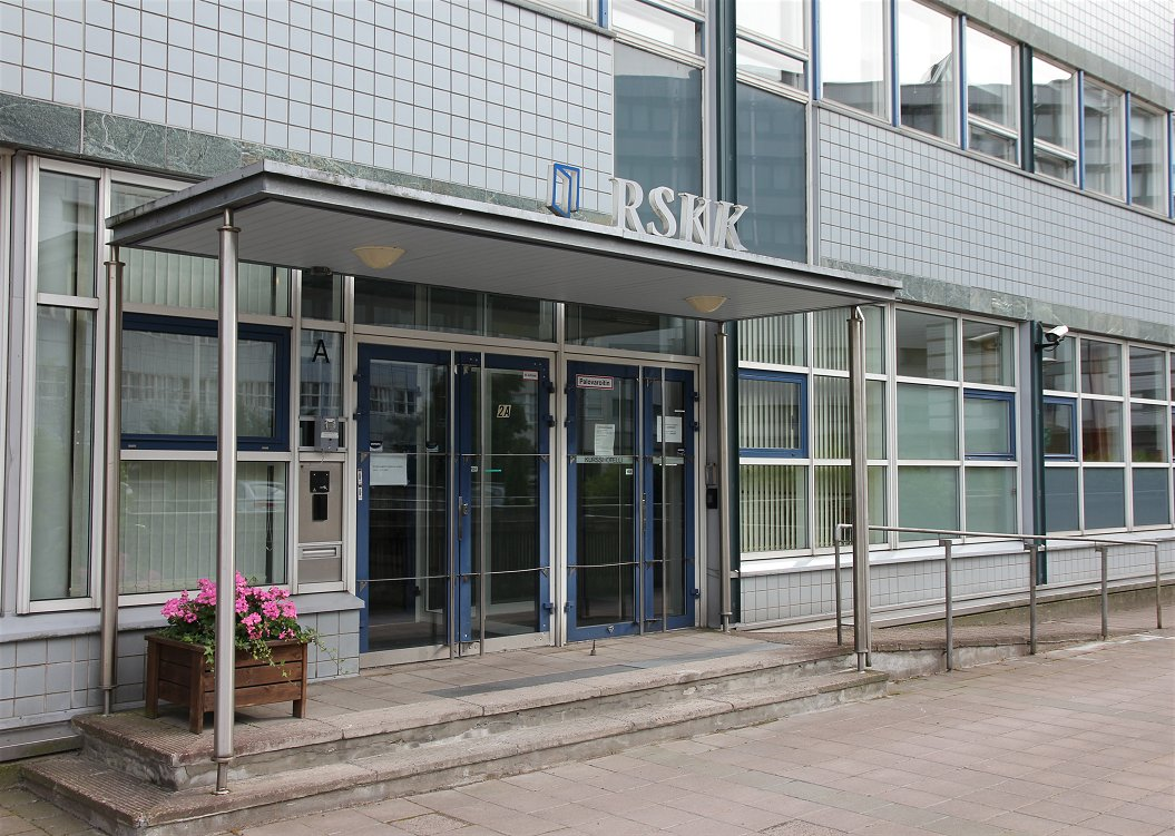 Rikosseuraamusalan koulutuskeskuksen (RSKK) sisäänkäynti Vantaan Tikkurilan suuralueen Jokiniemen kaupunginosassa, noin 200 metriä Tikkurilan rautatieaseman eteläpuolella. RKSS on Rikosseuraamuslaitoksen (RISE) valtakunnallinen yksikkö ja toimii osoitteessa Vernissakatu 2A, 01300 Vantaa.